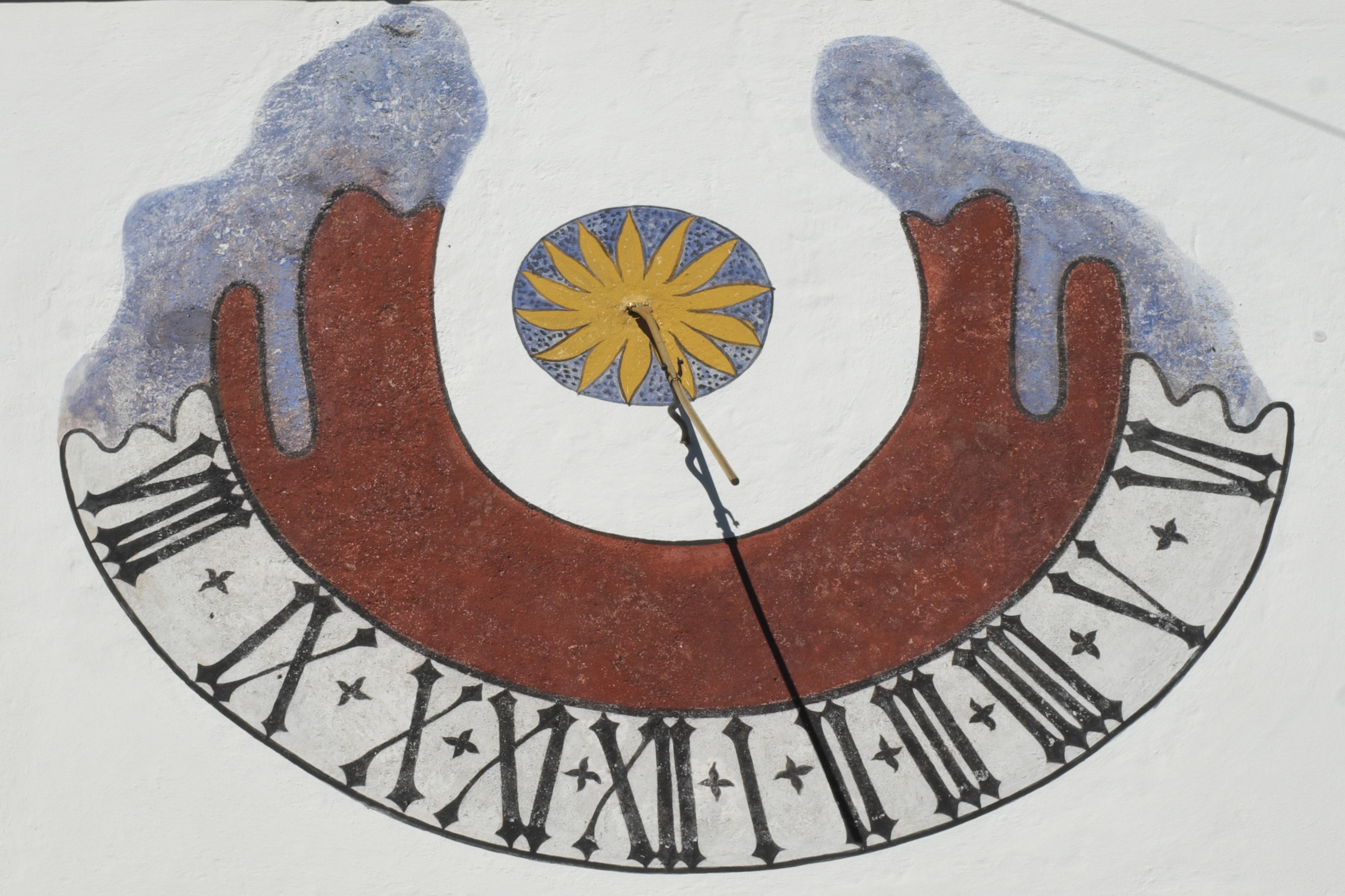 Katholische Pfarrkirche St. Petrus und Paulus in Petzenhausen, einem Ortsteil von Weil (Oberbayern) im Landkreis Landsberg am Lech (Bayern/Deutschland), Sonnenuhr